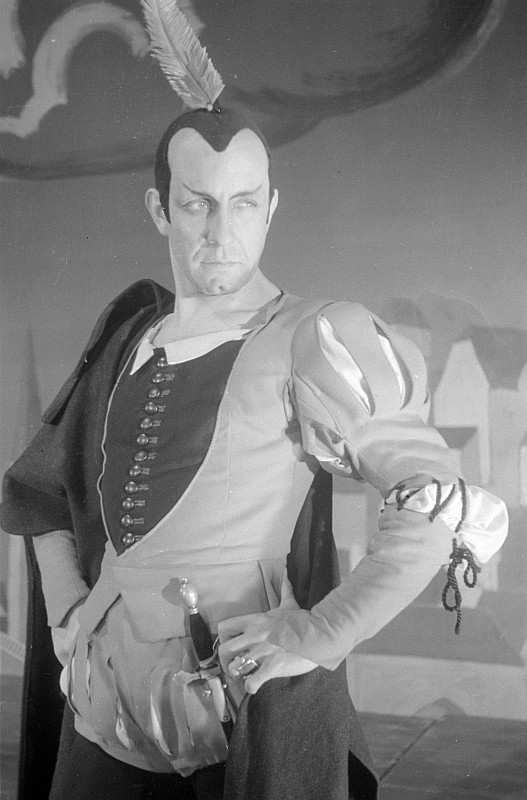 Original image description from the Deutsche Fotothek Szenenbilder "Urfaust" mit Otto Eduard Hasse als Mephisto